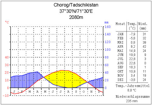 Klimadiagramm Chorog